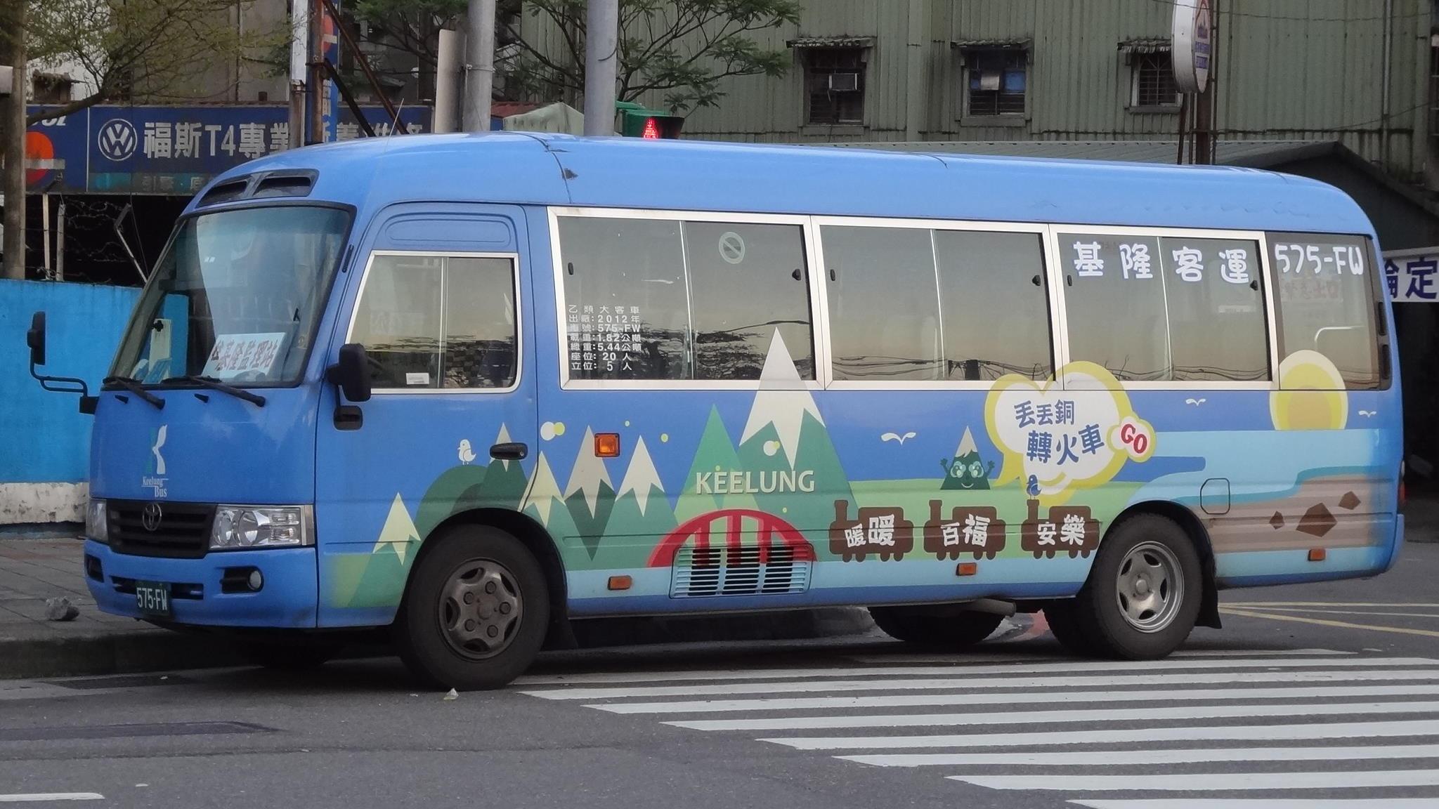 基隆客運的2012年豐田Coaster中型巴士575-FW左側外觀。